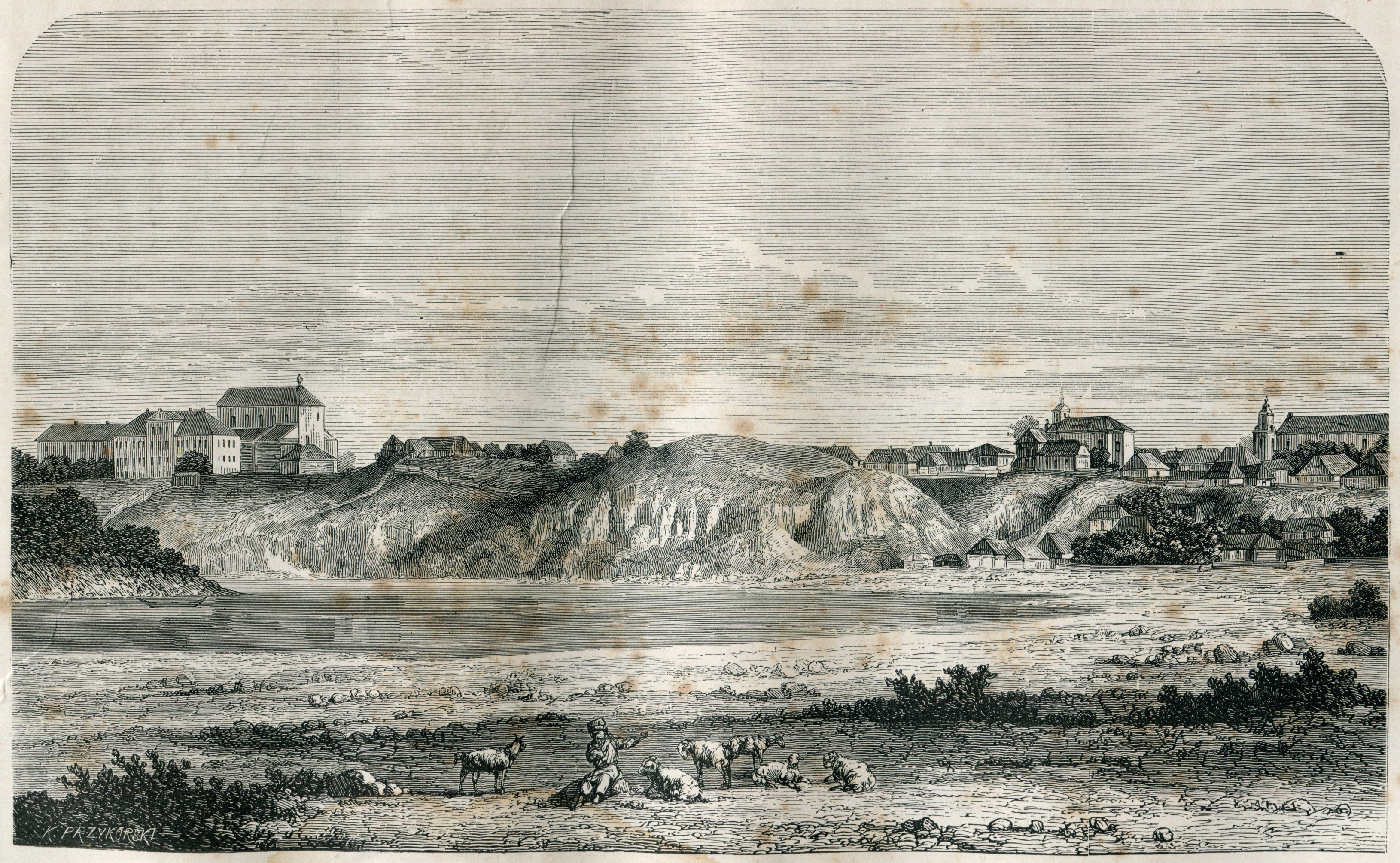 Беларуская (тарашкевіца): Дарагічын (Darahičyn), рака Буг (Buh)